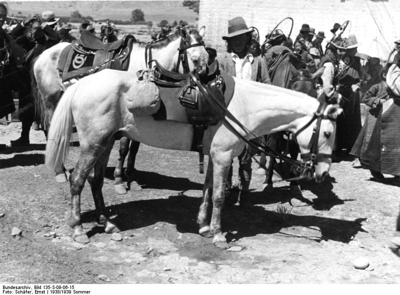 Gyantse, Volksfest (Sommerfest), Leben, Treiben, Essen und schöne Pferde